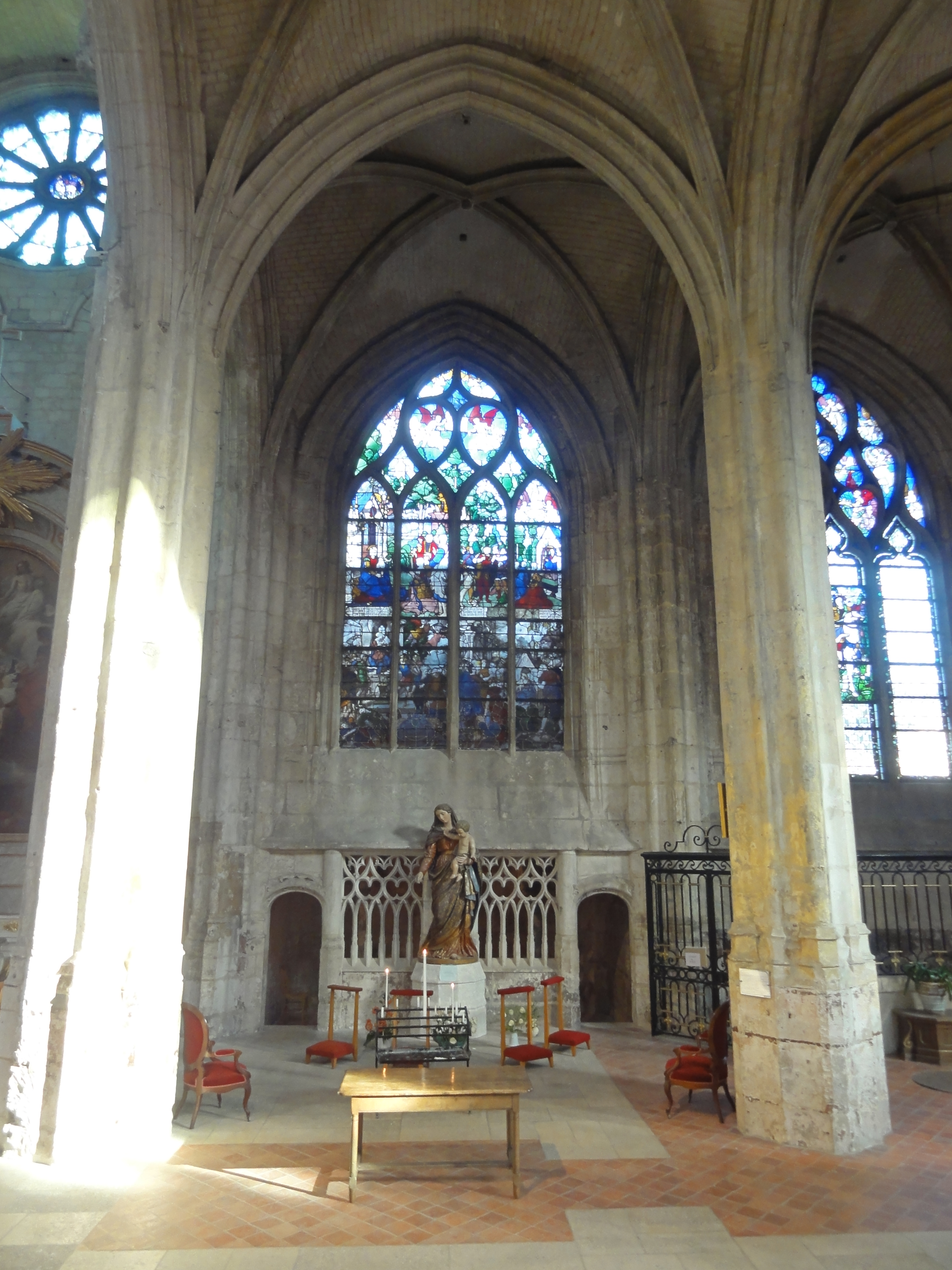 Collatéral nord, 1ère chapelle (N.D. de Lorette).